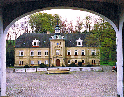 Herregården Herchendsgave, Fruering Sogn Skanderborg/Århus Amt , Danmark Image by me user:Nico-dk/Nils N Jepsen